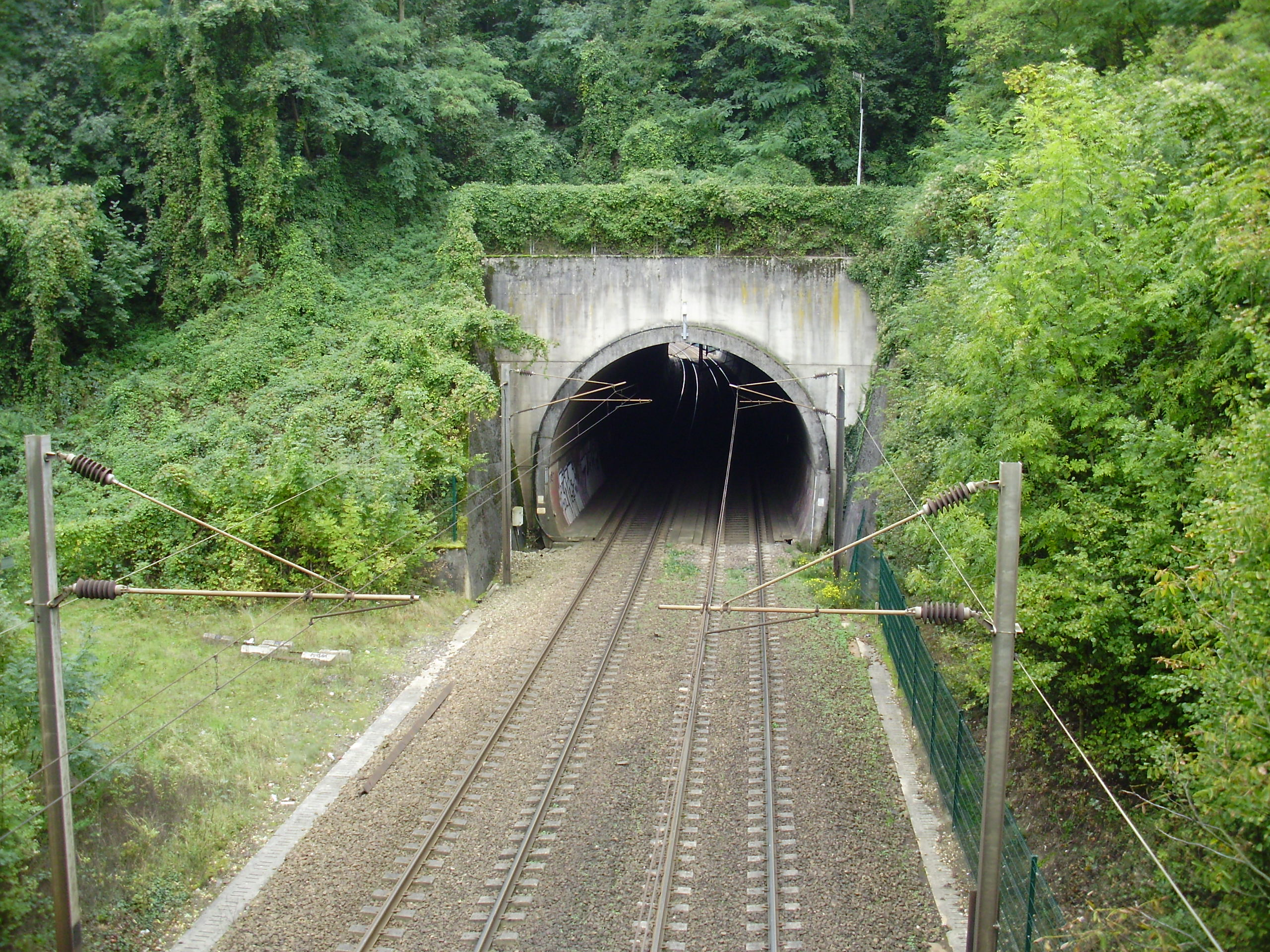 Tunnel ferroviaire de Chalifert (nord), à Chalifert, Seine-et-Marne, France (entrée est, depuis le pont routier de la route de Lesches - D89)